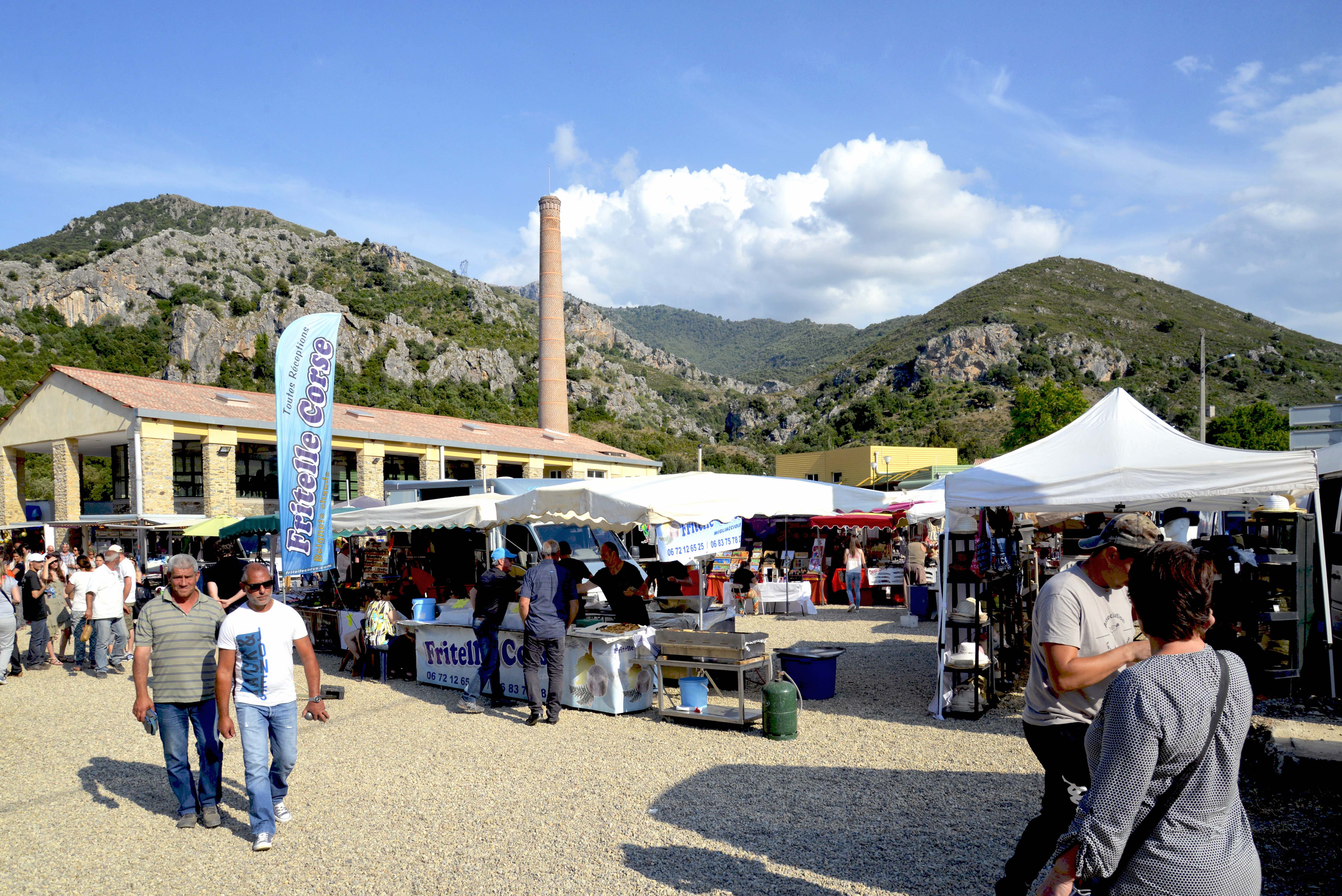 Omessa, Centre Corse - Le champ de foire (2015) de Francardo, à l'ancienne briquèterie